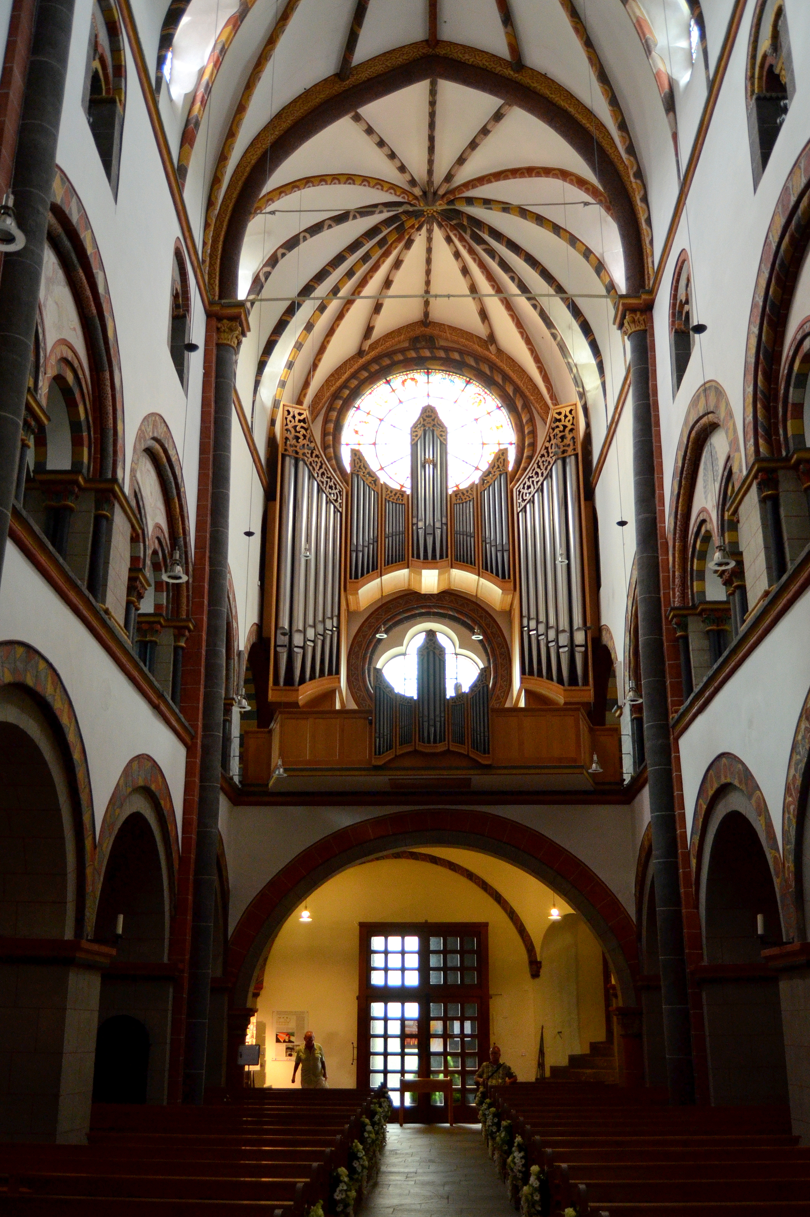 Orgel